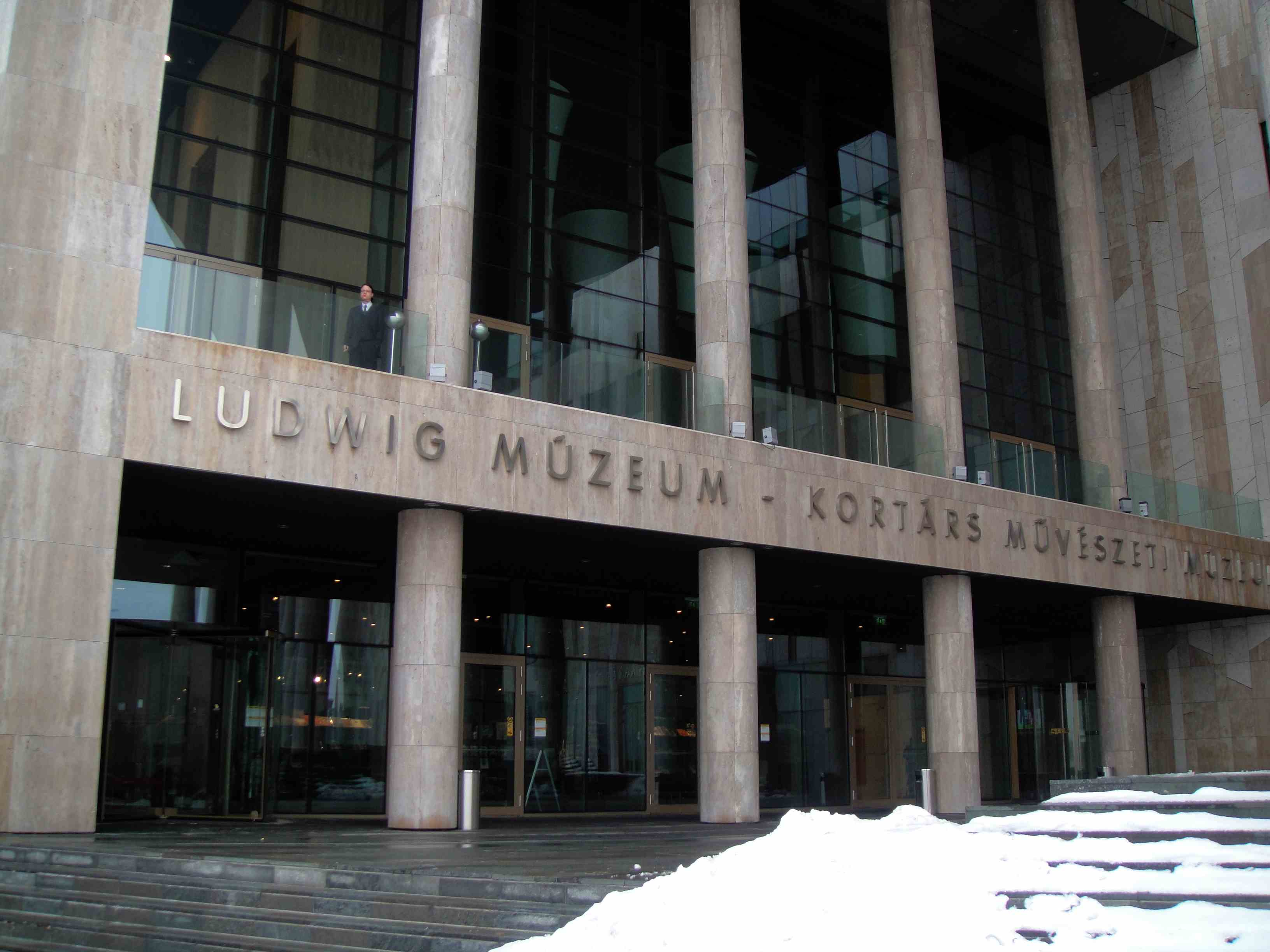 Музей Людвига в Будапеште